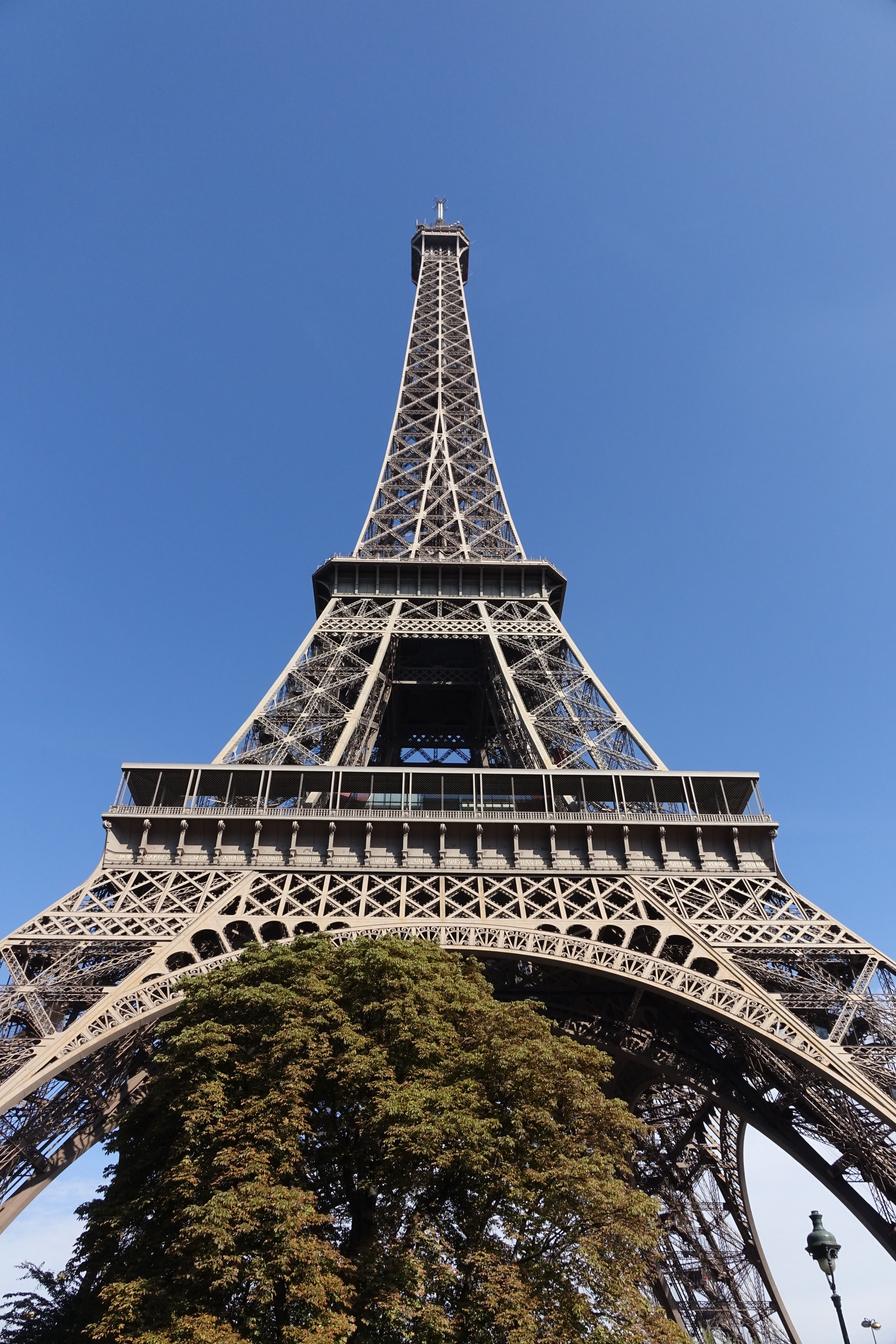 141005Eiffel Tower, Paris, France